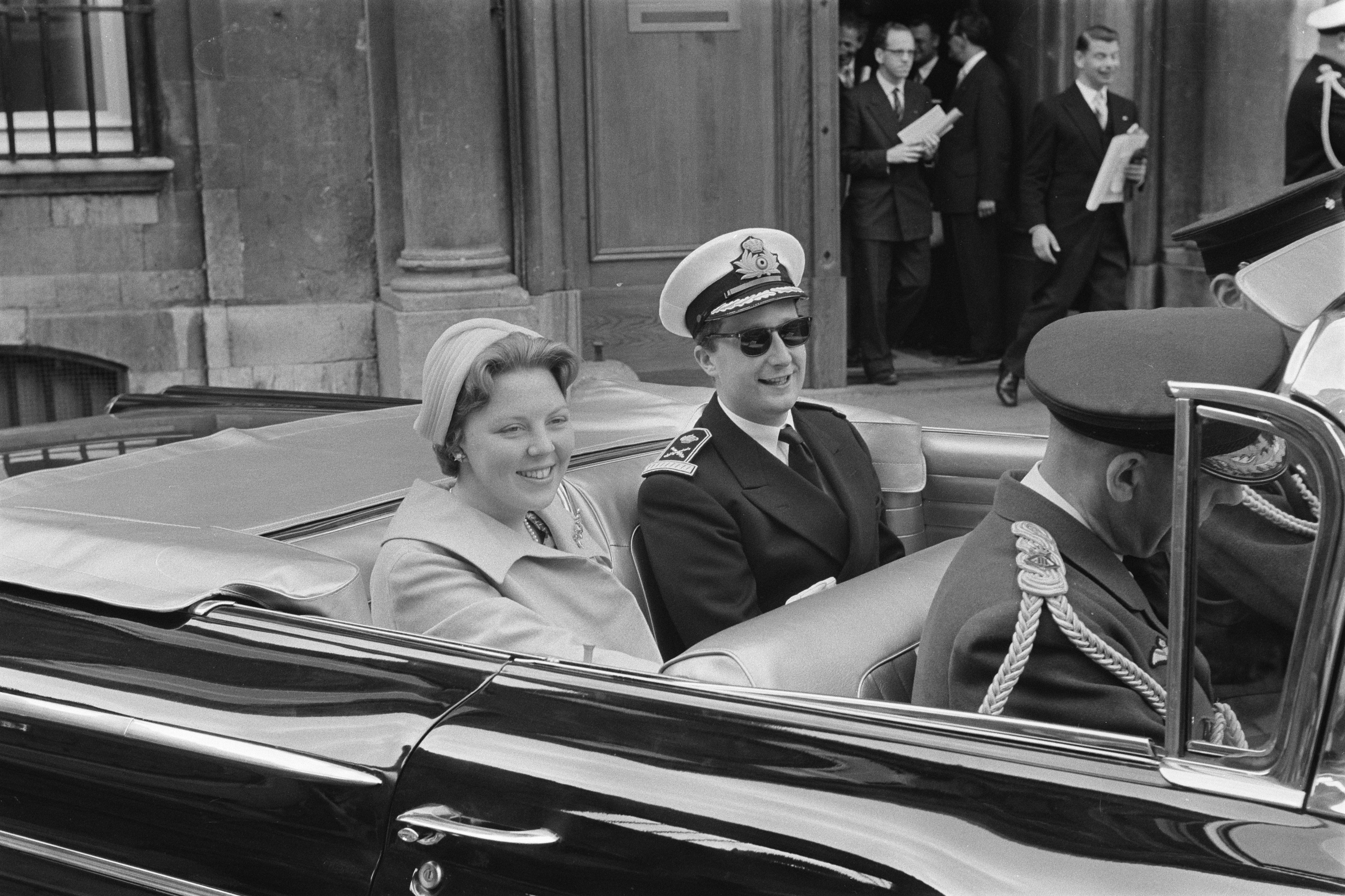 Collectie / Archief : Fotocollectie Anefo Reportage / Serie : [ onbekend ] Beschrijving : Tweede dag van het Koninklijk bezoek aan Belgie, aankomst en bezoek aan Plantijnmuseum Datum : 31 mei 1960 Locatie : België Trefwoorden : aankomsten, bezoeken Instellingsnaam : Museum Plantin-Moretus Fotograaf : Pot, Harry / Anefo Auteursrechthebbende : Nationaal Archief Materiaalsoort : Negatief (zwart/wit) Nummer archiefinventaris : bekijk toegang 2.24.01.05 Bestanddeelnummer : 911-3009